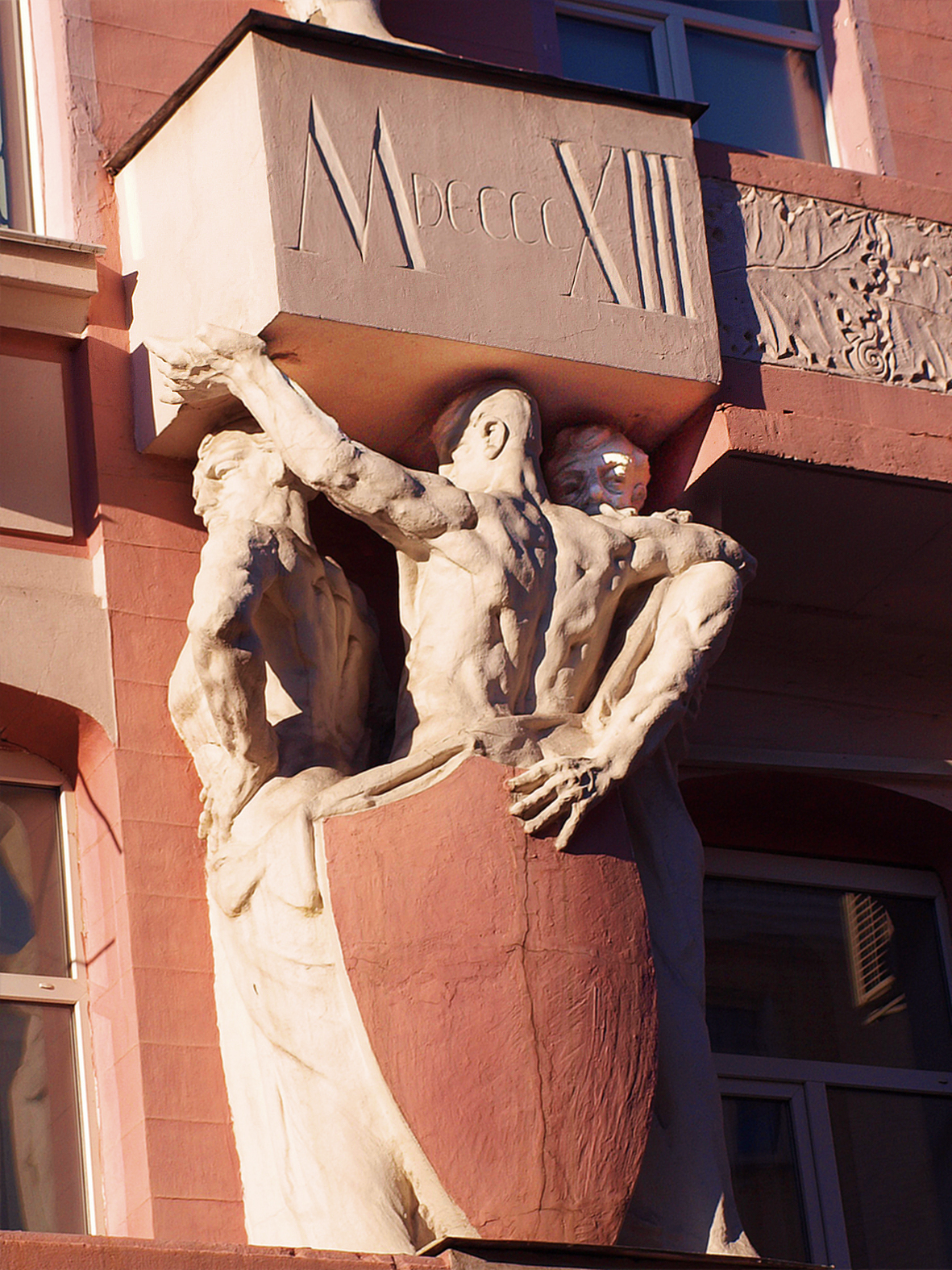 Атланти. Будинок Козеровського на вул. Костьольна, 7, Київ